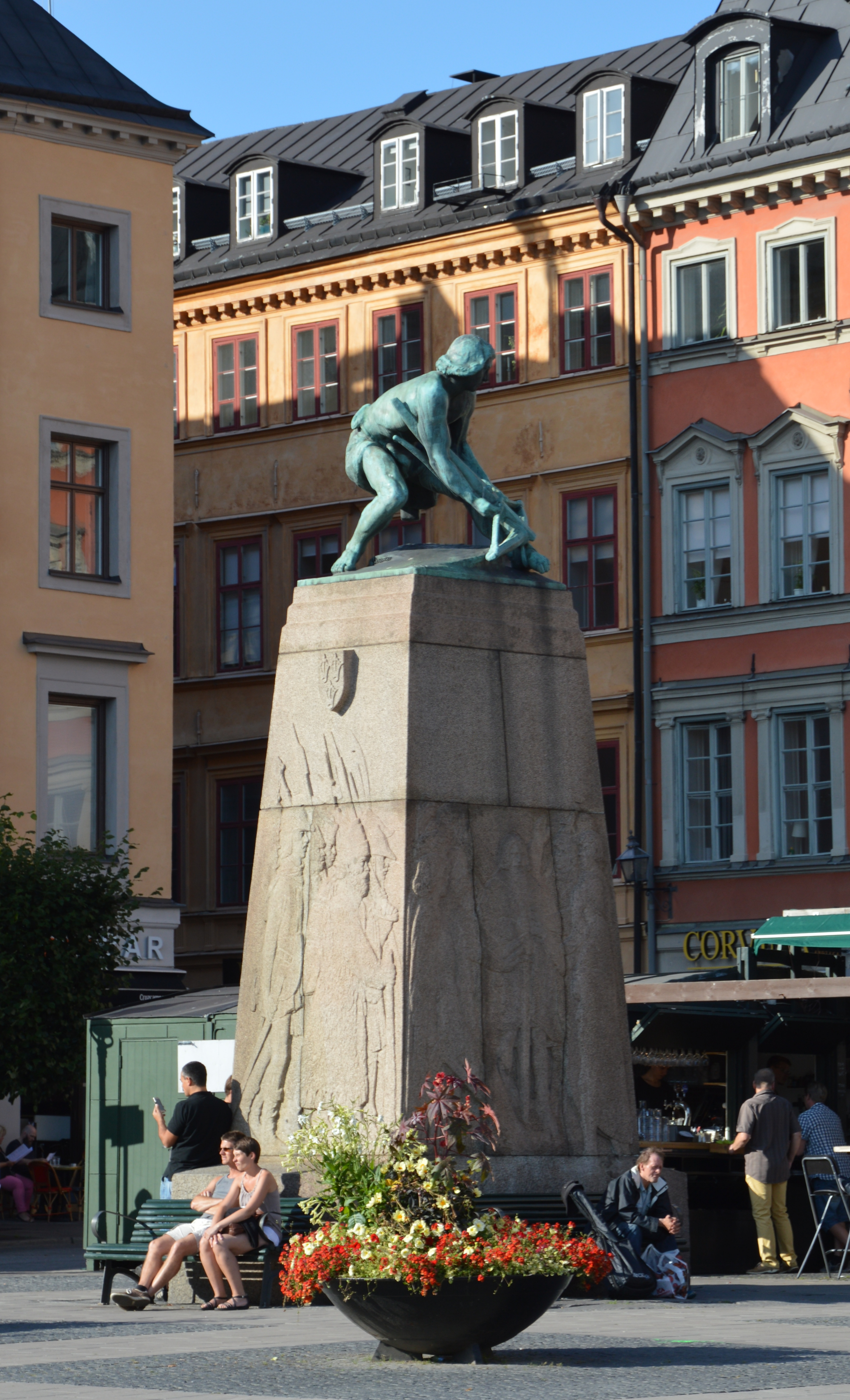 Denkmal auf dem Kornhamnstorg in Gamla stan